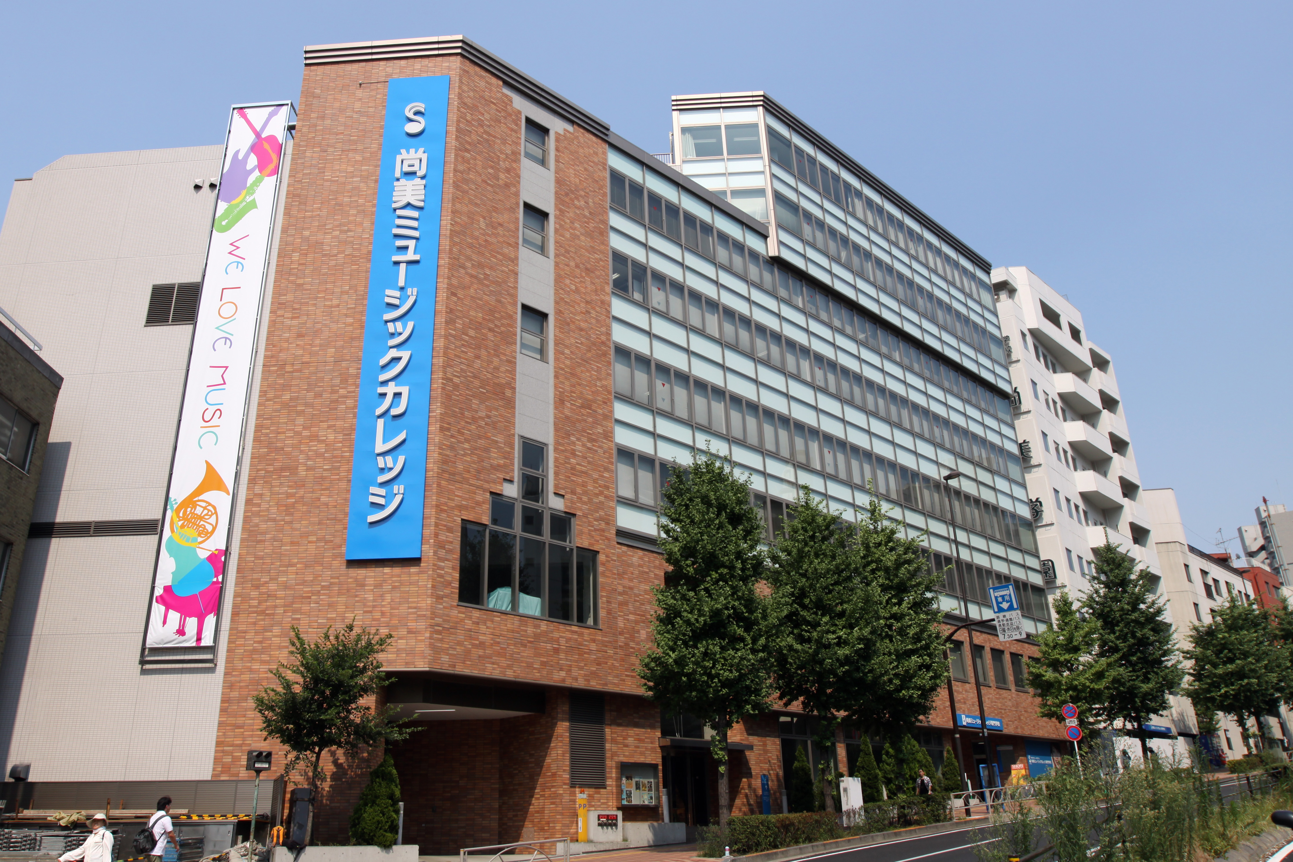 尚美ミュージックカレッジ専門学校本館の外観です。